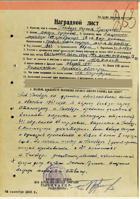 Наградной лист Ганзбурга Израиля Григорьевича (1923-1995) из архива Министерства обороны Российской Федерации, фонд 33 опись 686196 дело 3039